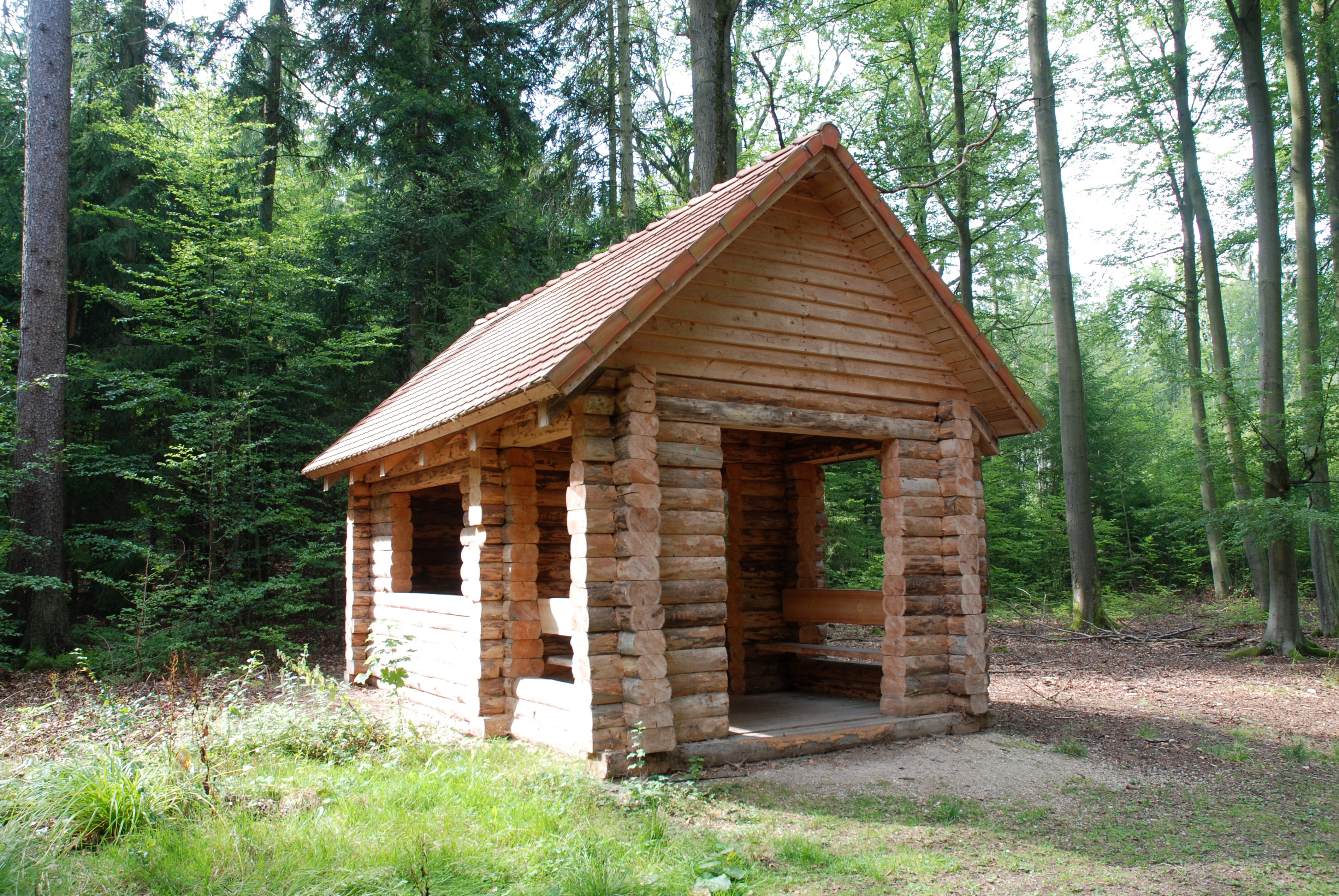 Russelův srub u Russelovy cesty v karlovarských lázeňských lesích